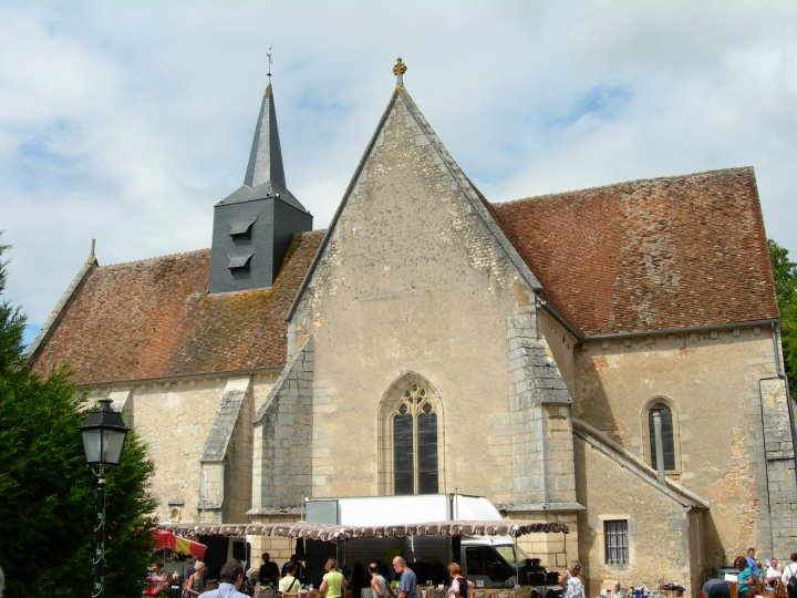 Eglise de Saint-Loup (Nièvre)